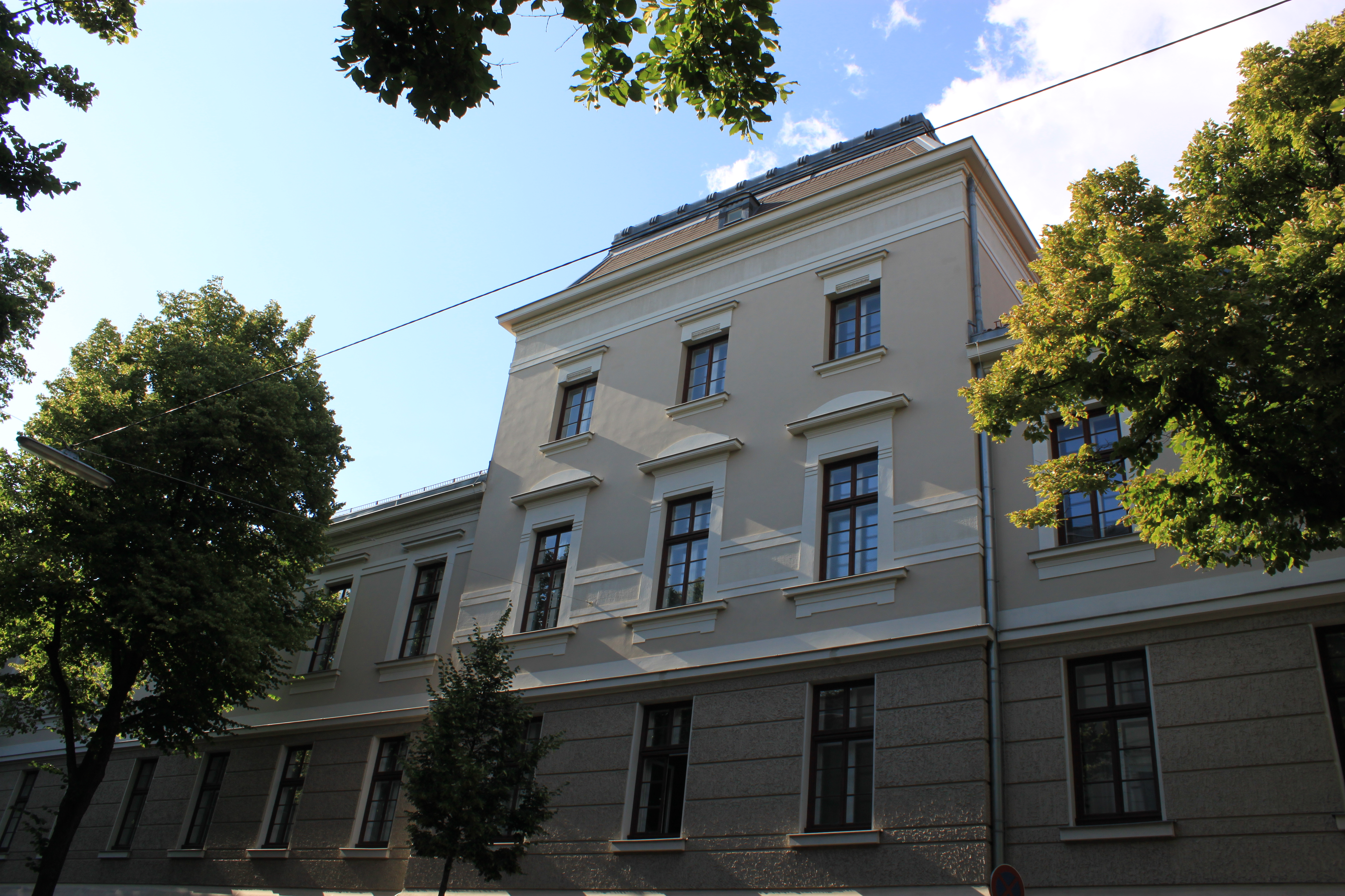 Biedermann-Huth-Raschke-Kaserne, Breitenseer Straße 88, 1140 Wien